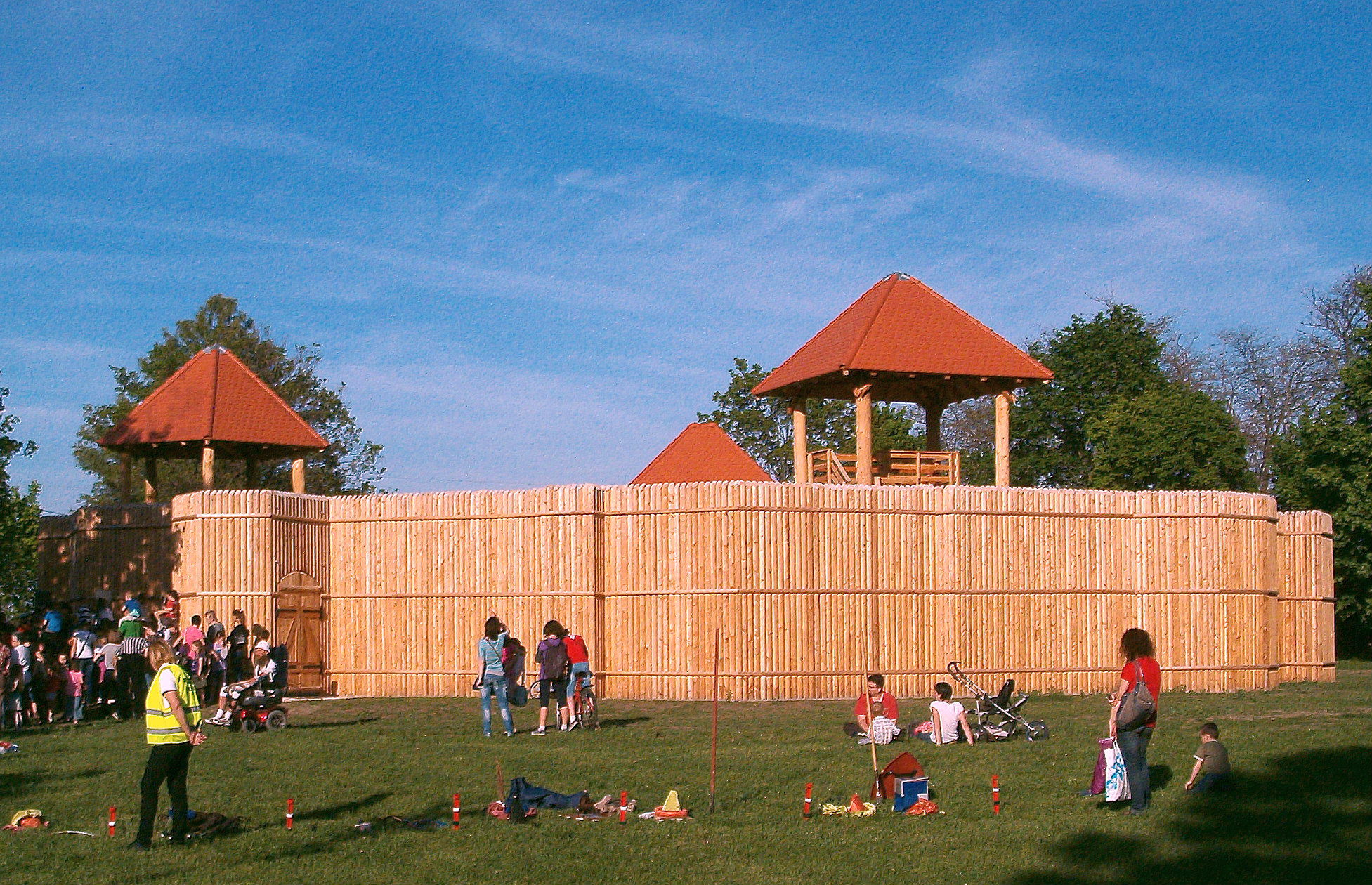 Az egri vár másolata, az úgynevezett rönkvár a Gárdonyhoz tartozó Agárdpusztán.